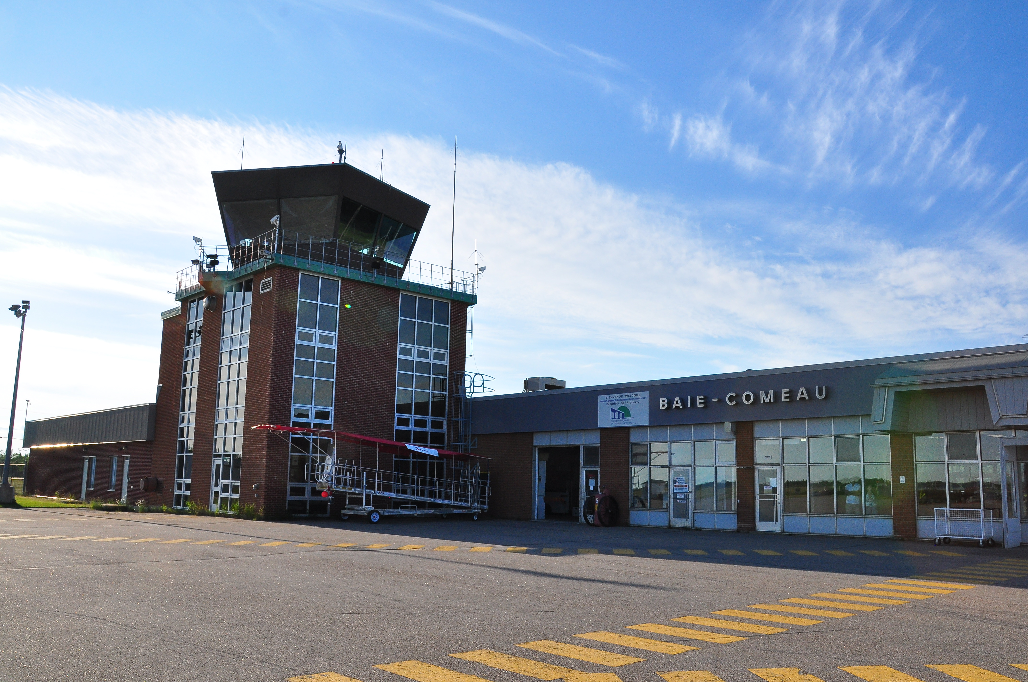 Aéroport de Baie-Comeau (CYBC)